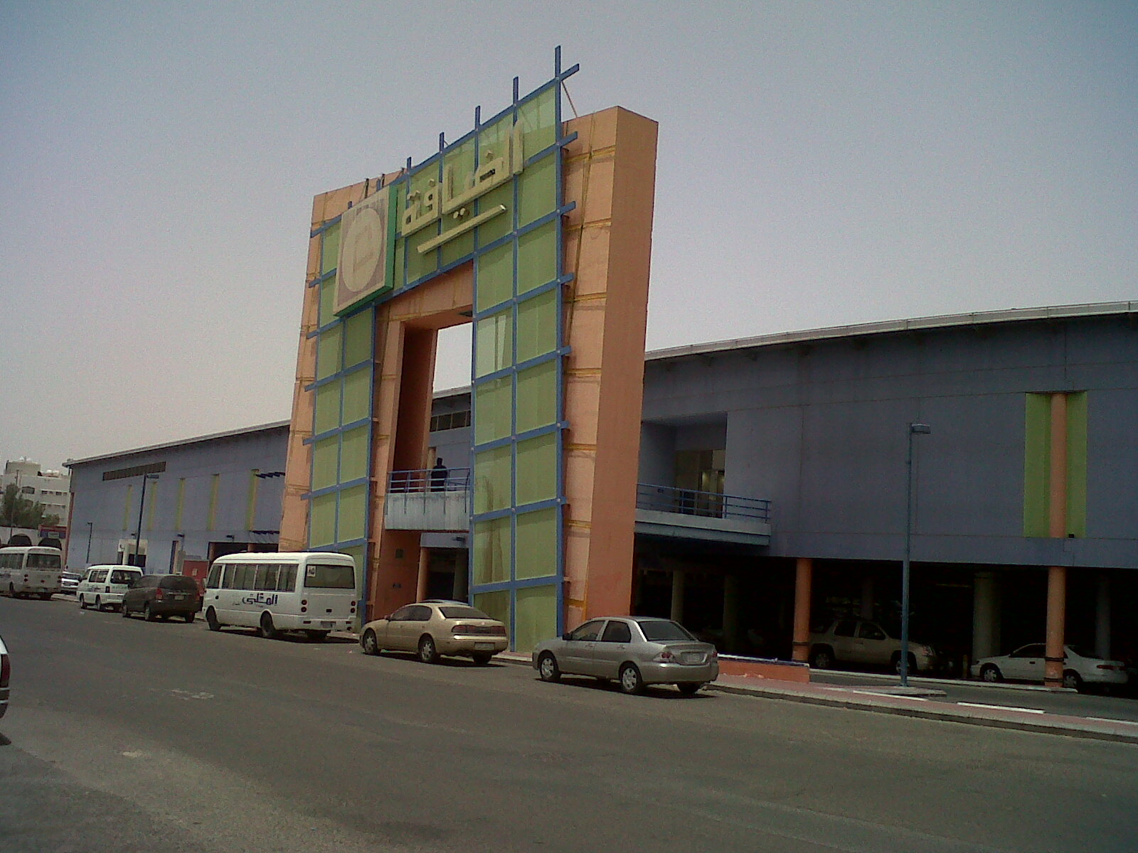 dayafa market